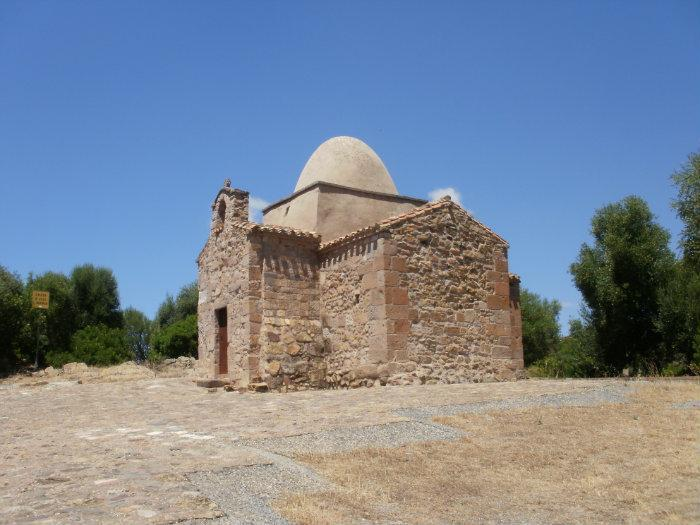 Chiesa di Sant'Elia di Tattinu, Narcao